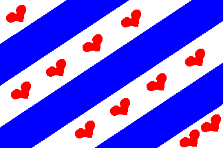 Vlag van De Ommelanden